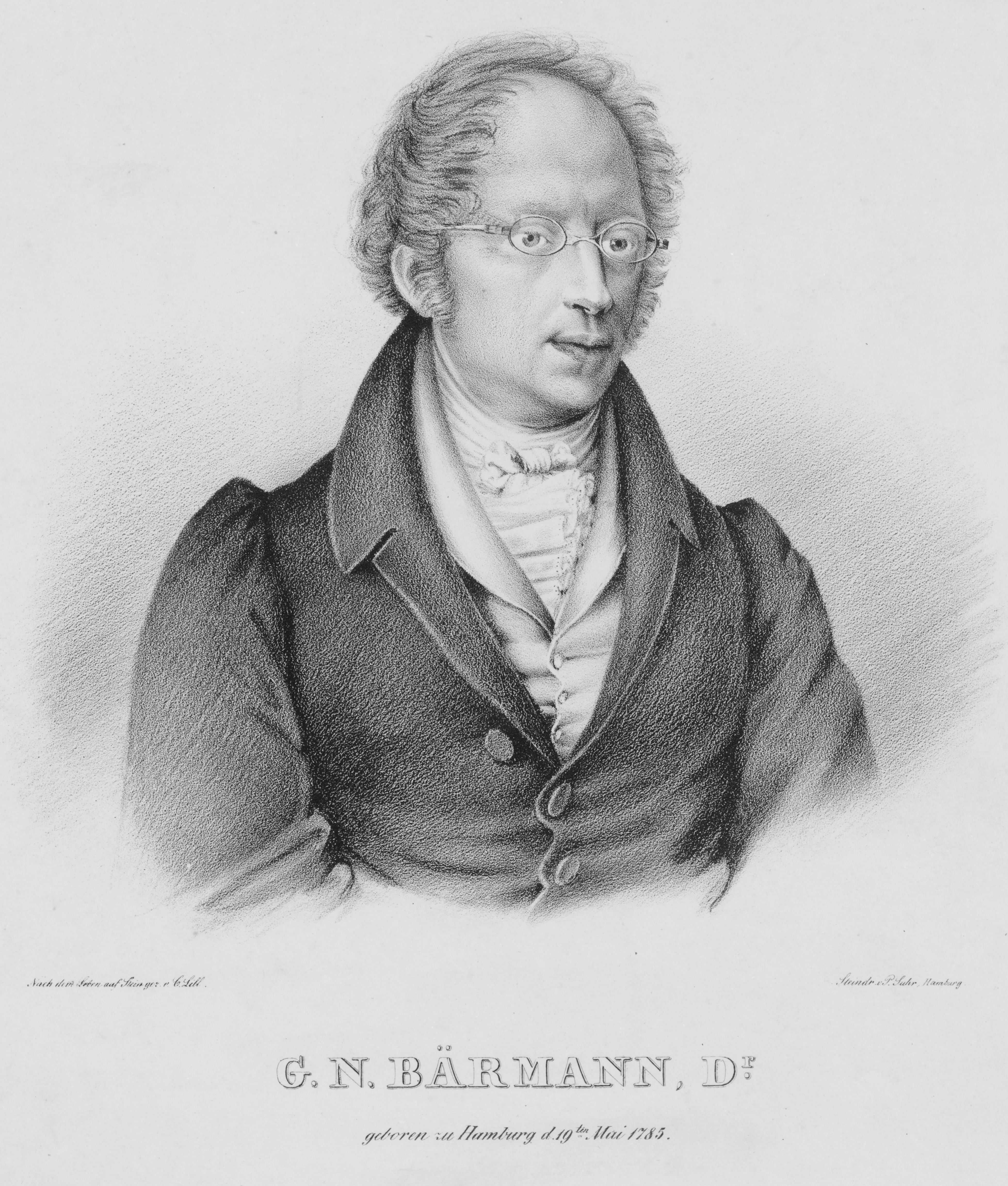 G. N. Bärmann, Dr.